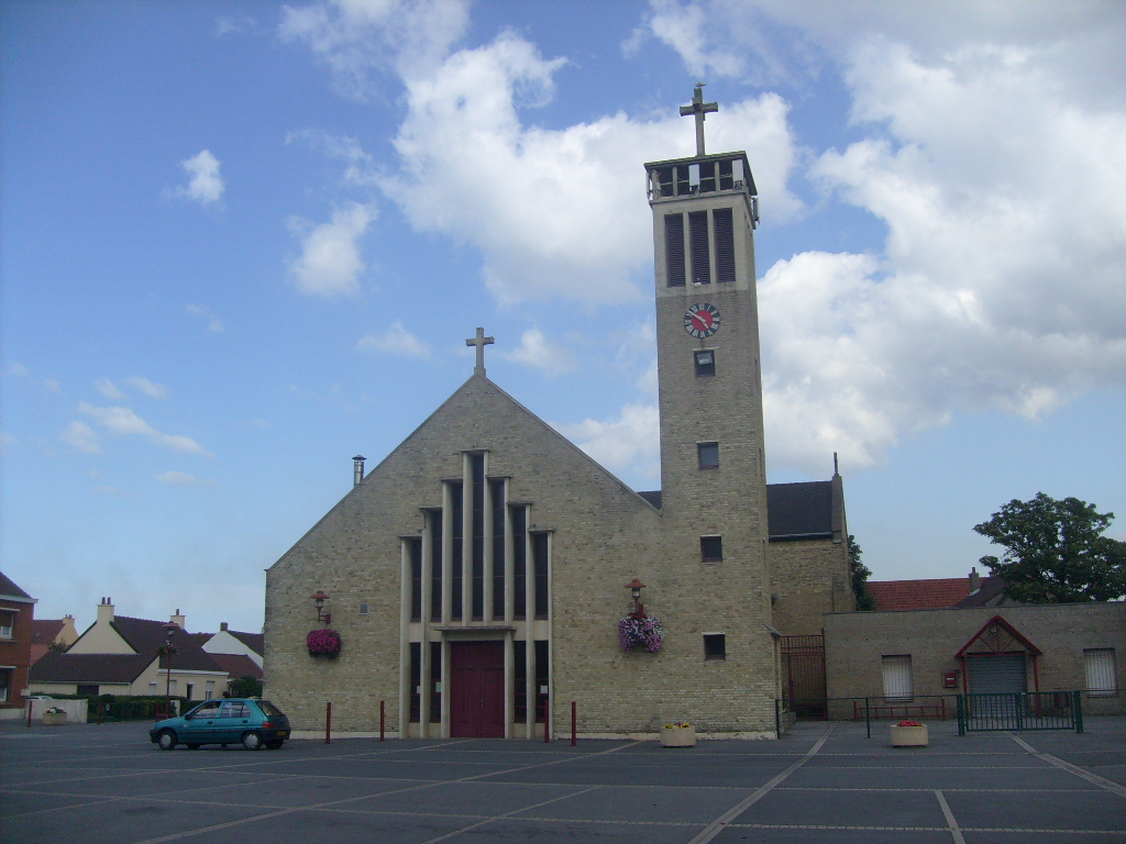 L'église de Fort-Mardyck